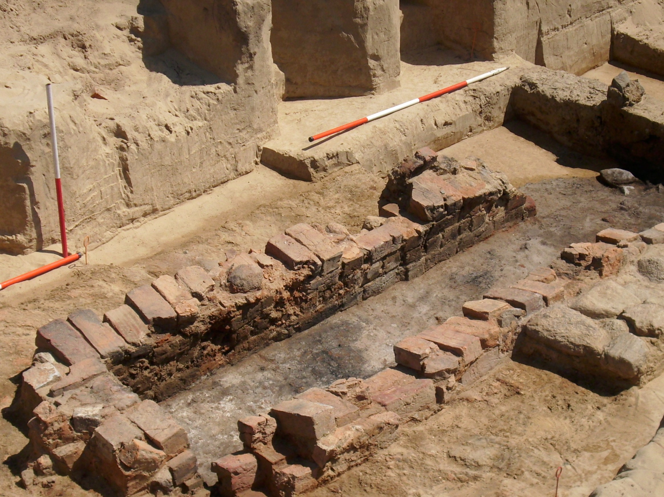 Ausgrabung des Altenhof in Schönerlinde im Mai 2011, Land Brandenburg, Deutschland